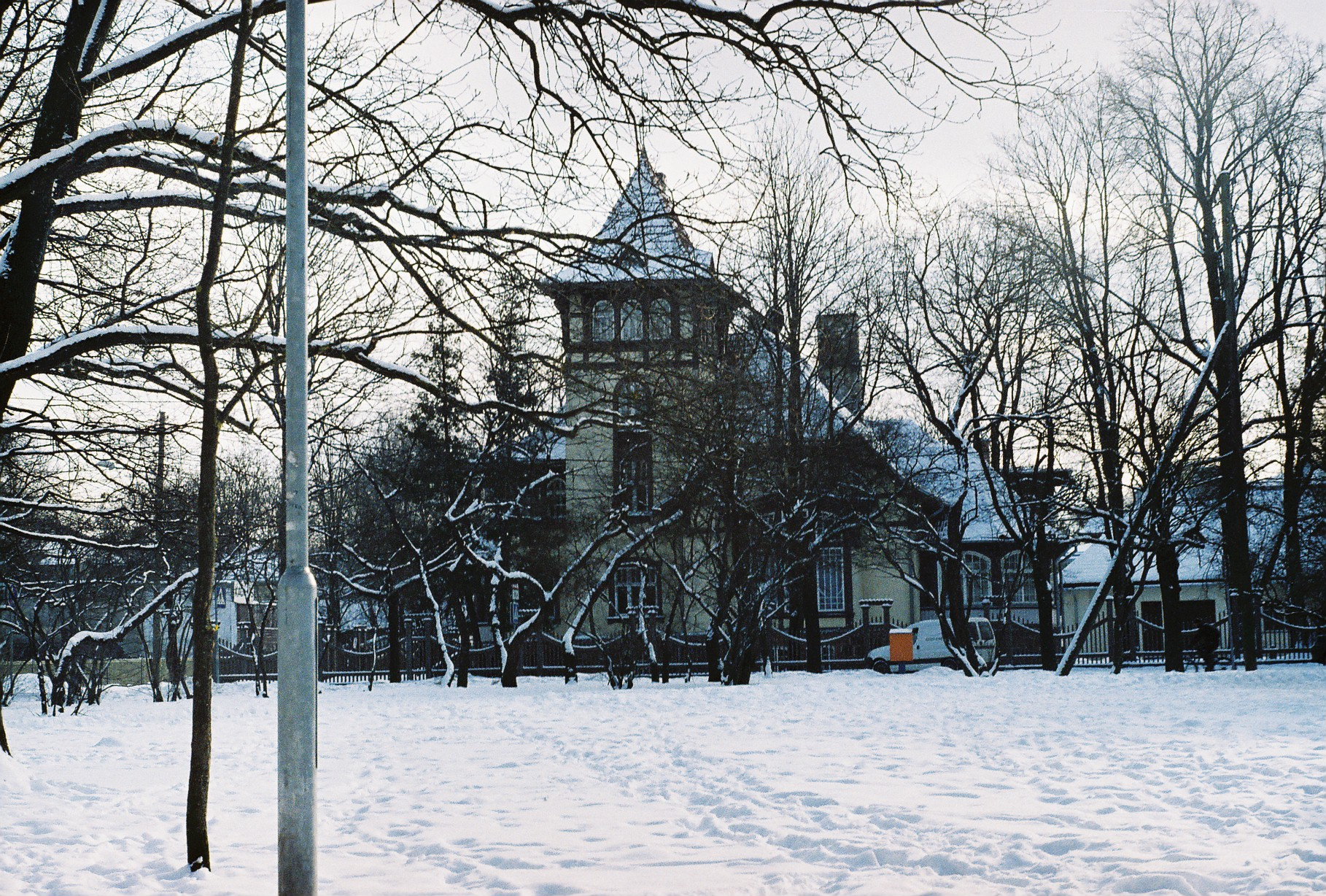 Tartu Saksa Kultuuri Instituut, endine korp. "Neobalta" konvendihoone Tartus, Kastani 1, 1902